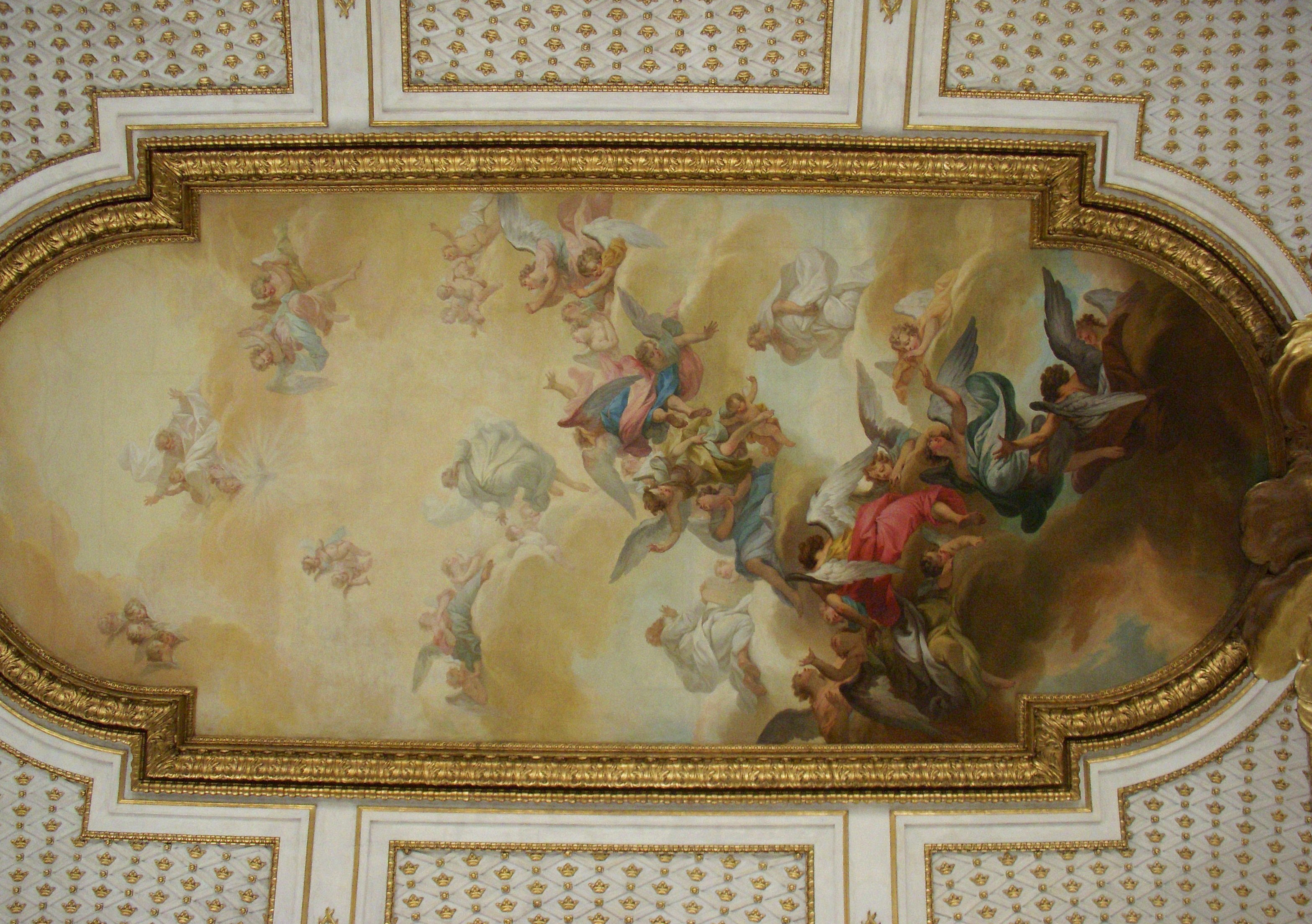 Slottskyrkan, Stockholms slott, takplafond målad av Guillaume Thomas Taraval och Johan Pasch. Takplafonden ingår i kyrkans tre takspeglar, som har Kristi himmelsfärd som gemensamt tema, 1750-talets mitt.